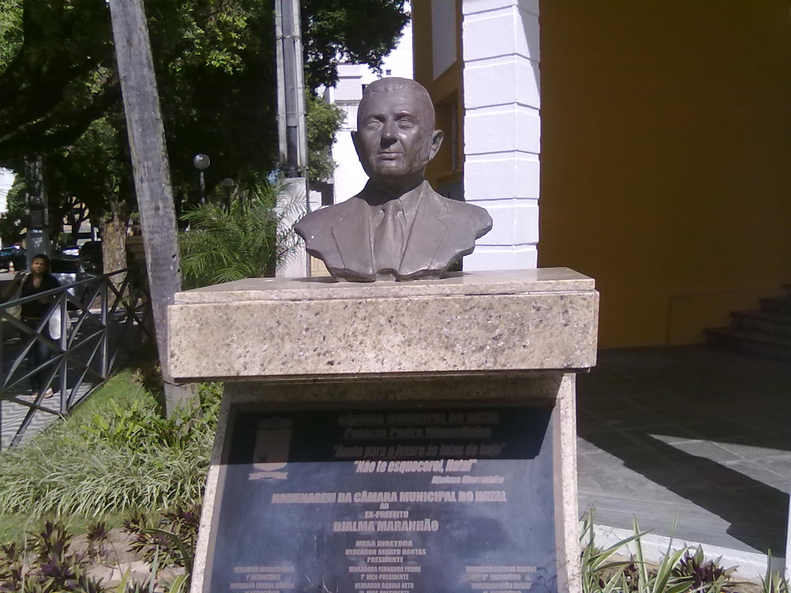 Busto de Djalma Maranhão em frente a Câmara de Vereadores de Natal